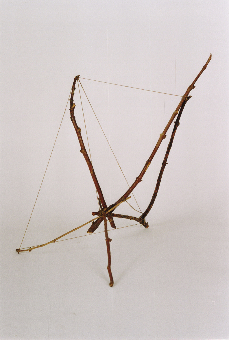 Escultura realizada con ramas de árbol y cuerdas